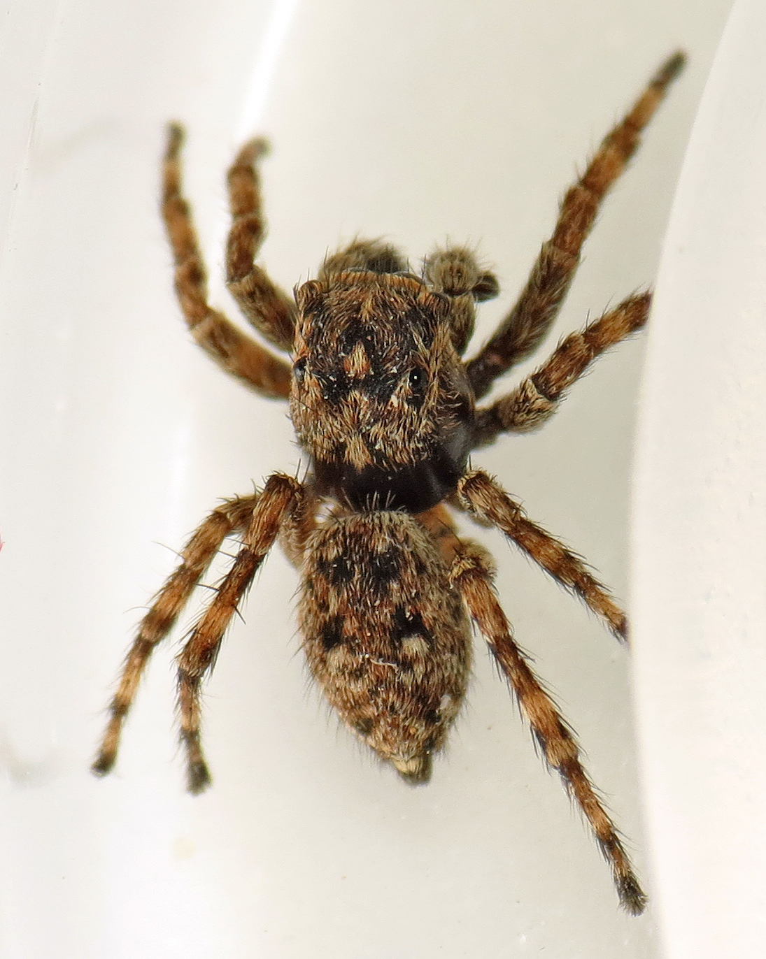 male Sitticus pubescens